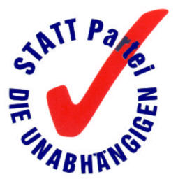 Logo der Statt Partei